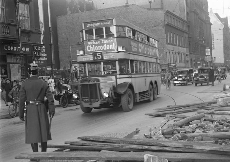 Grosse Streik-Unruhen in Berlin ! Der Verkehrsstreik der Berliner Strassenbahn, Untergrundbahn und Autobusse, welcher schon Menschenopfer gefordert hat, dauert an. Ein von Arbeitswilligen geführter Autobuss, fährt unter Polizeischutz durch die Strassen. Im Vordergrund eine von Streikenden errichtete Barrikade.